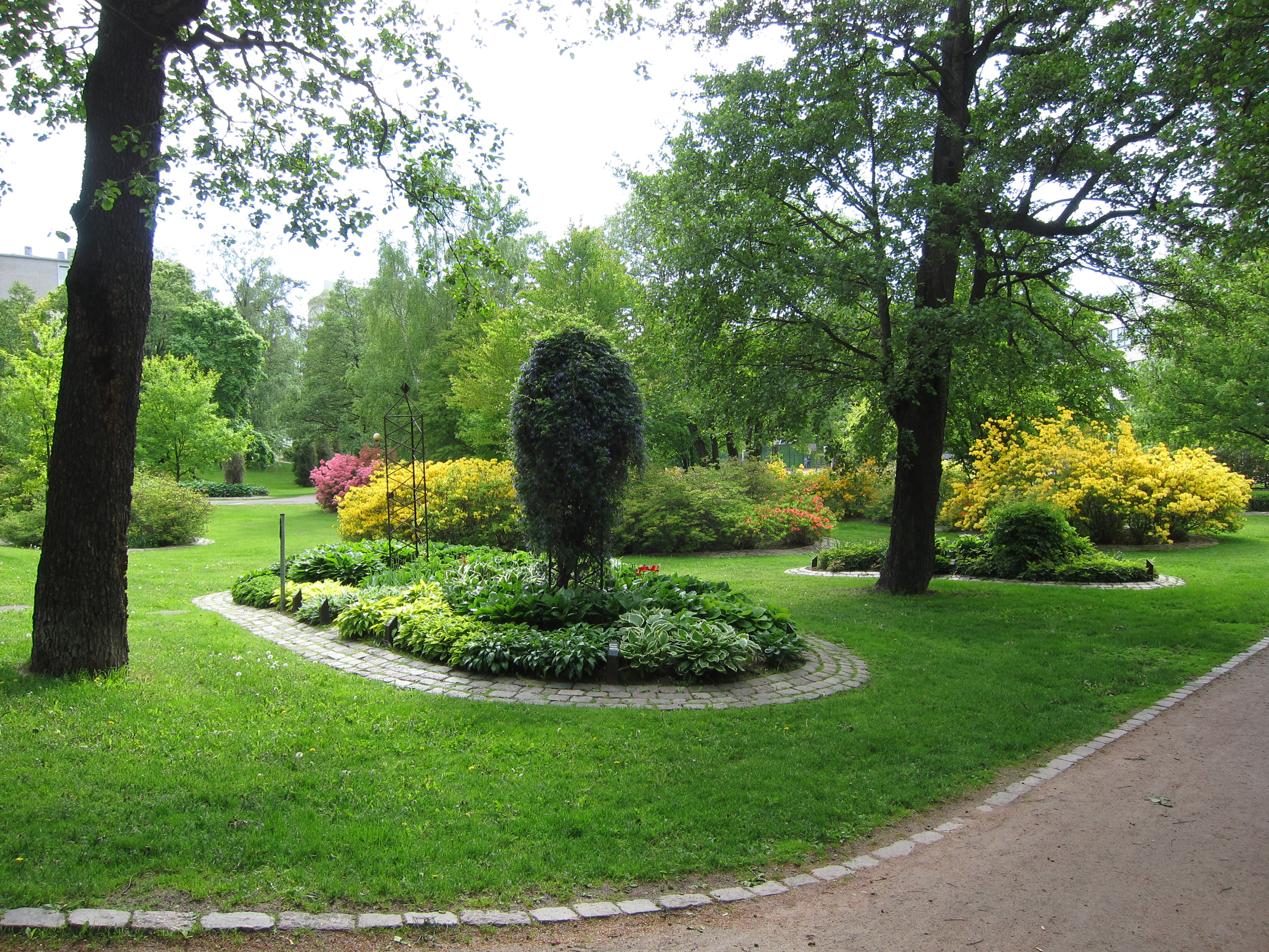 Fuksinpuistoa Kotkassa Suomessa.